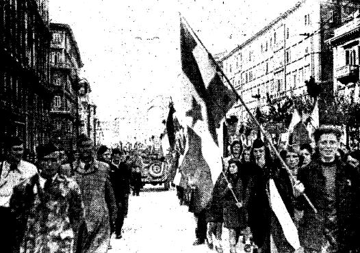 Narodnoosvobodilna vojska Jugoslavije v osvobojenem Trstu, maj 1945